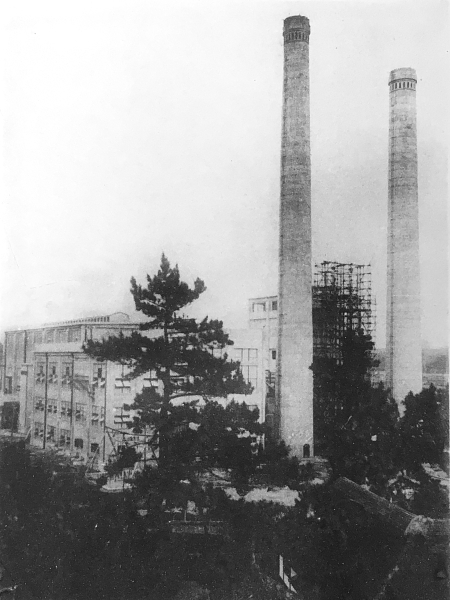 福岡県名島火力発電所の全景